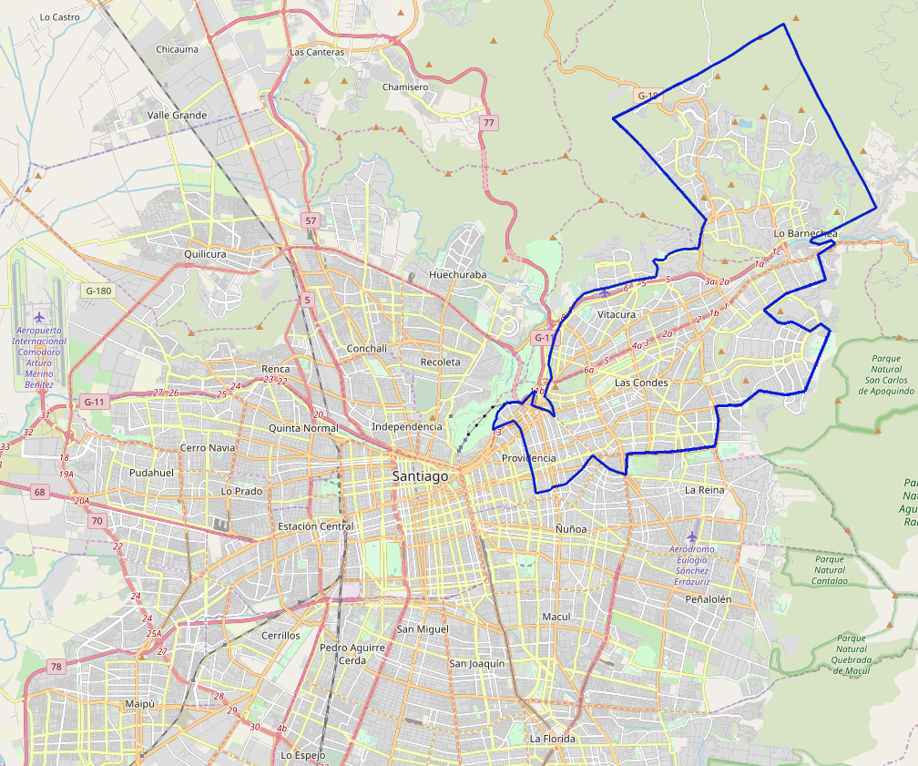 Mapa que muestra la cobertura que poseía TV Cable Intercom en Santiago de Chile hacia 1993, comprendiendo principalmente las comunas de Providencia, Las Condes, Vitacura y Lo Barnechea. This map may be incomplete, and may contain errors. Don't rely solely on it for navigation.